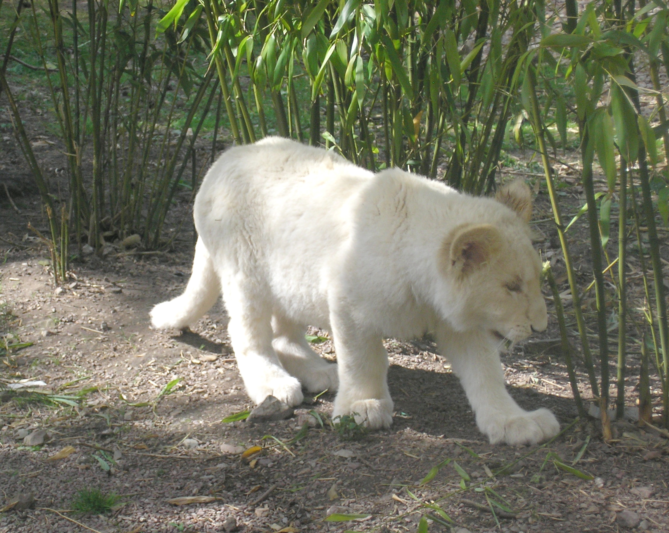 Jurques (Normandie, France). Un des trois lionceaux blancs de la portée 2008 du zoo.